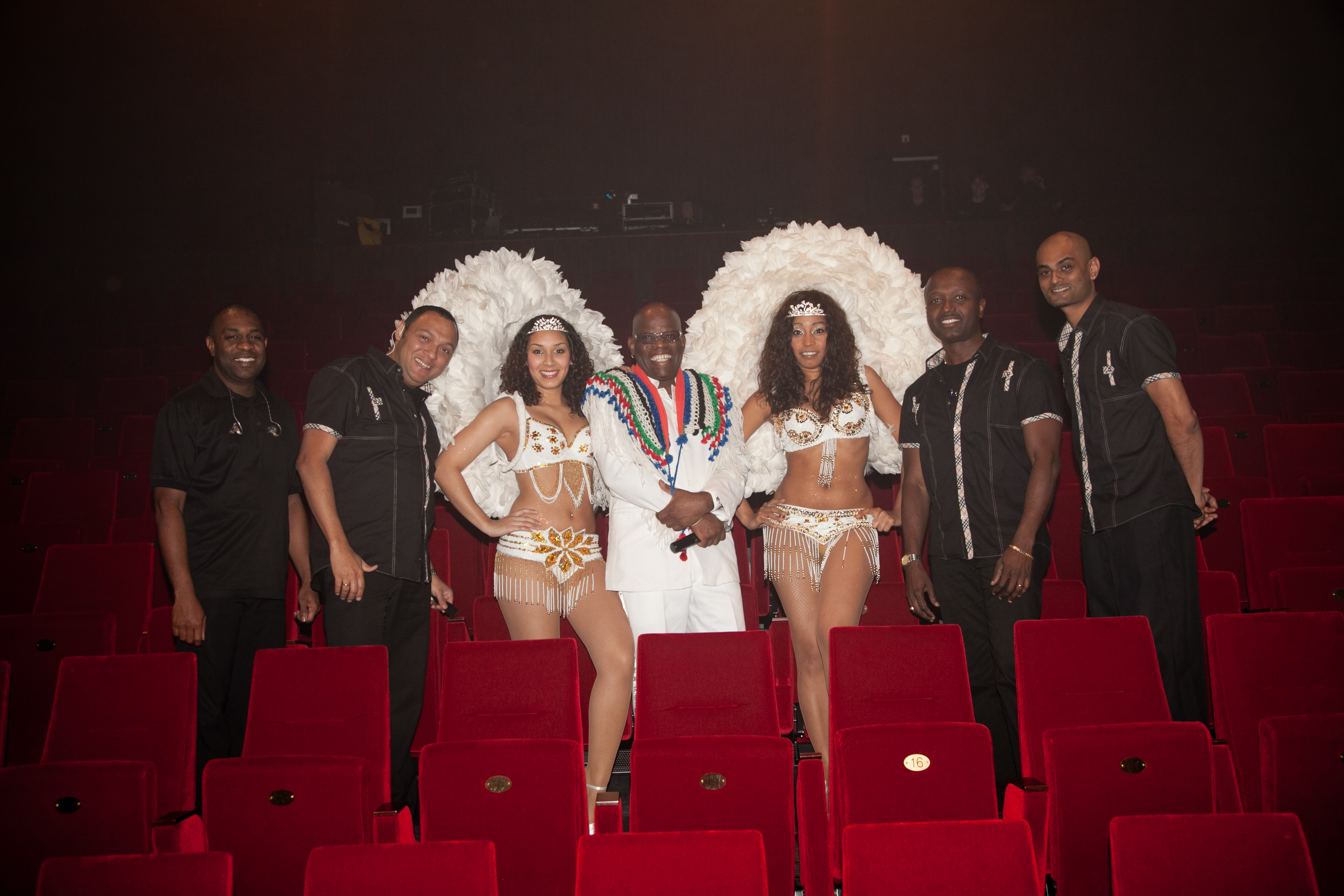 Foto is genomen in het MIDI Theater in Tilburg, tijdend de TRAFASSI TRALALA THEATERSHOW, door fotograaf Alie